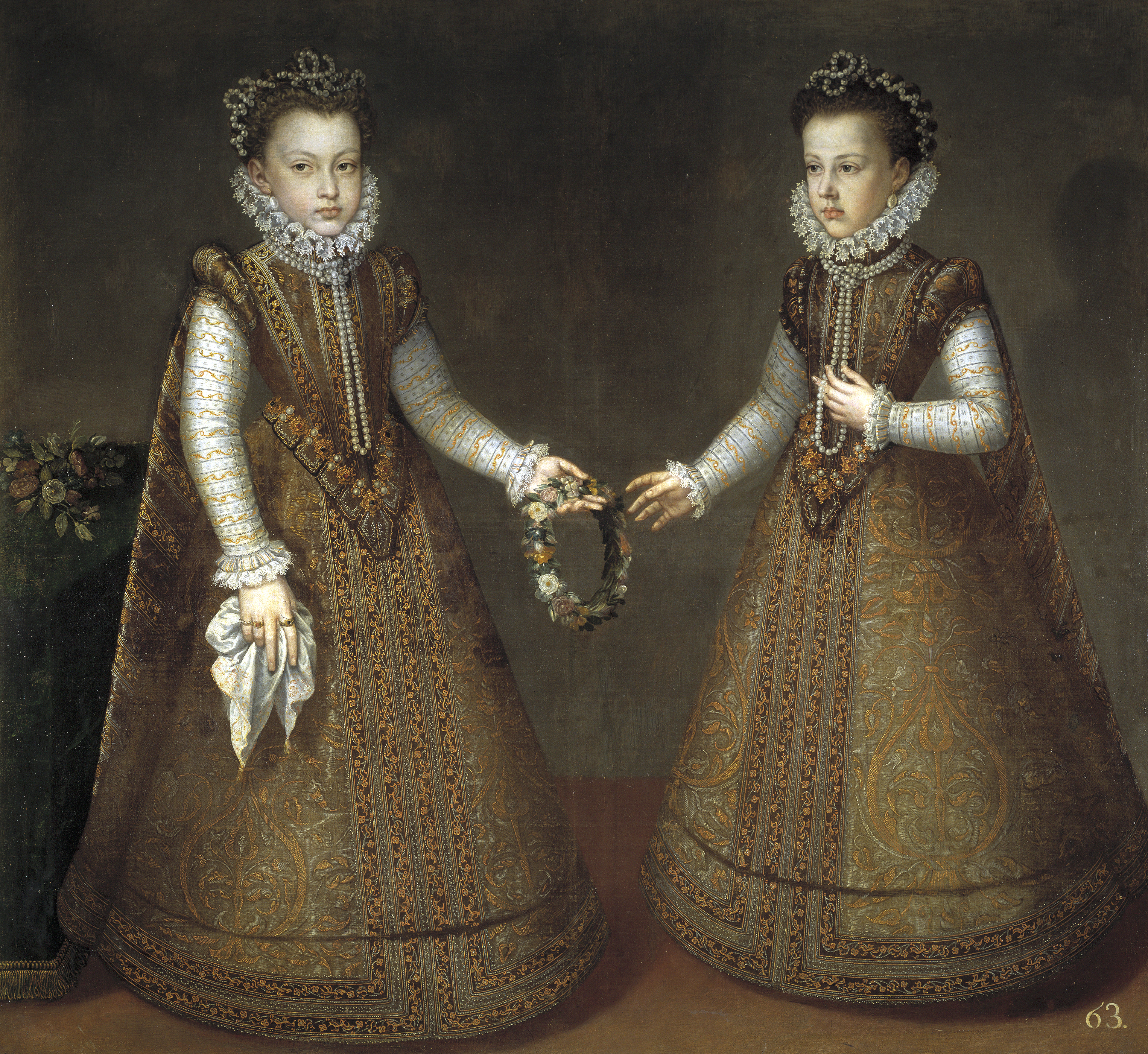 Retrato de las infantas Isabel Clara Eugenia (1566-1633), que fue hija del rey Felipe II de España y esposa del archiduque Alberto de Austria, y Catalina Micaela de Austria (1567-1597), que también fue hija del rey Felipe II y esposa del duque Carlos Manuel I de Saboya.